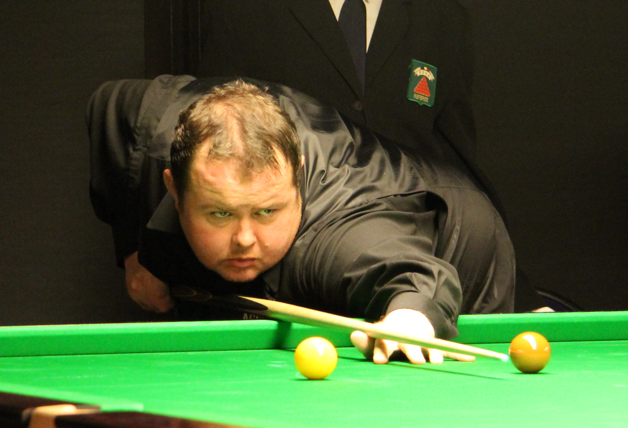 Stephen Lee beim Paul Hunter Classic 2011